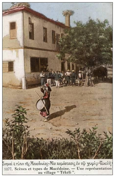 Село Текелиево, Солунско през Първата световна война.